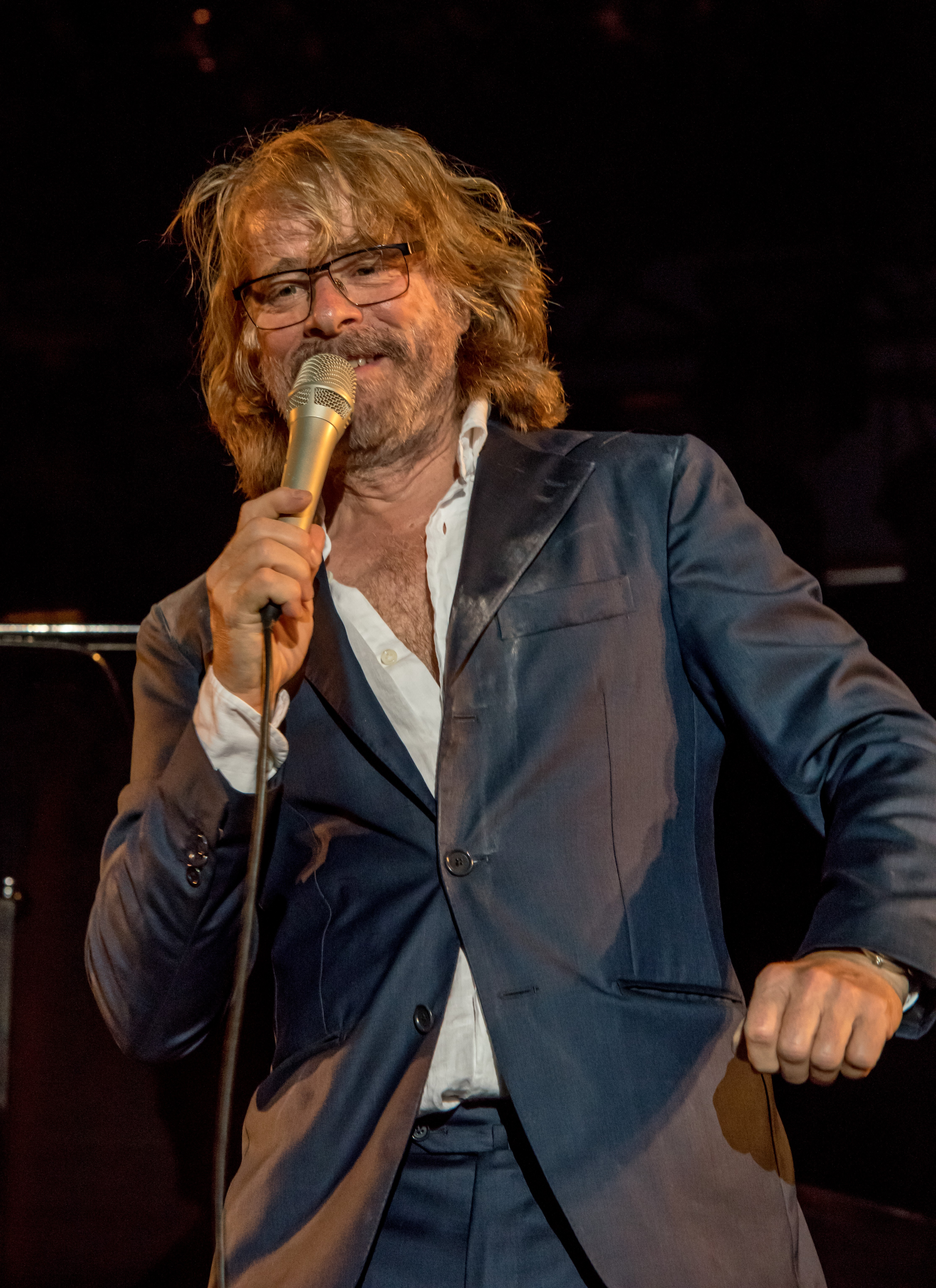 Bilder vom Zelt Musik Festival 2017 in Freiburg im Breisgau Helge Schneider am 10.07.2017